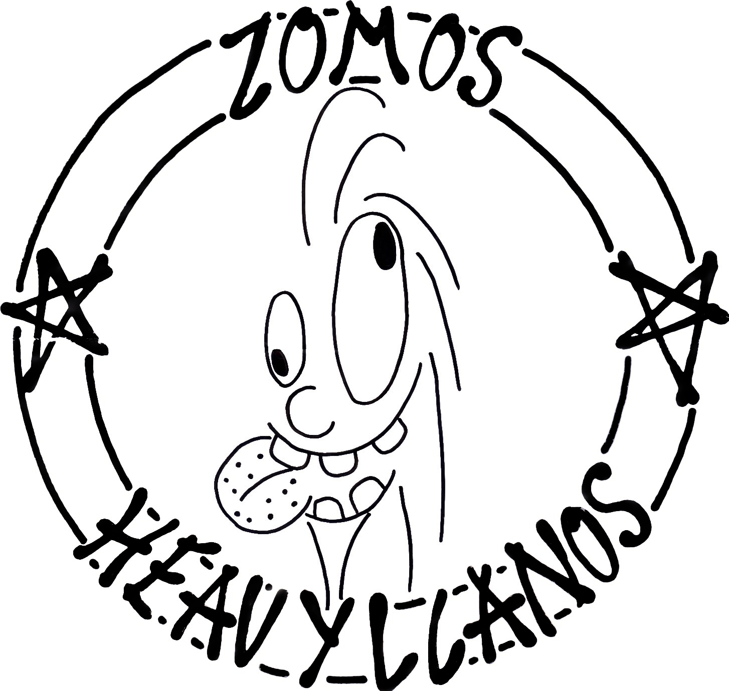 Logo de la asociación Heavyllanos